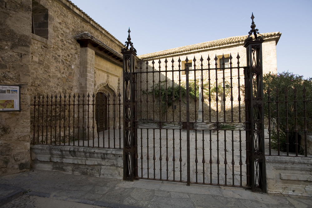 Colegiata de Pastrana, España.